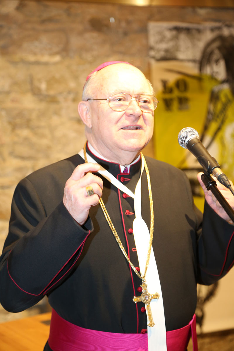 Bernhard Hermann Backovsky-4084